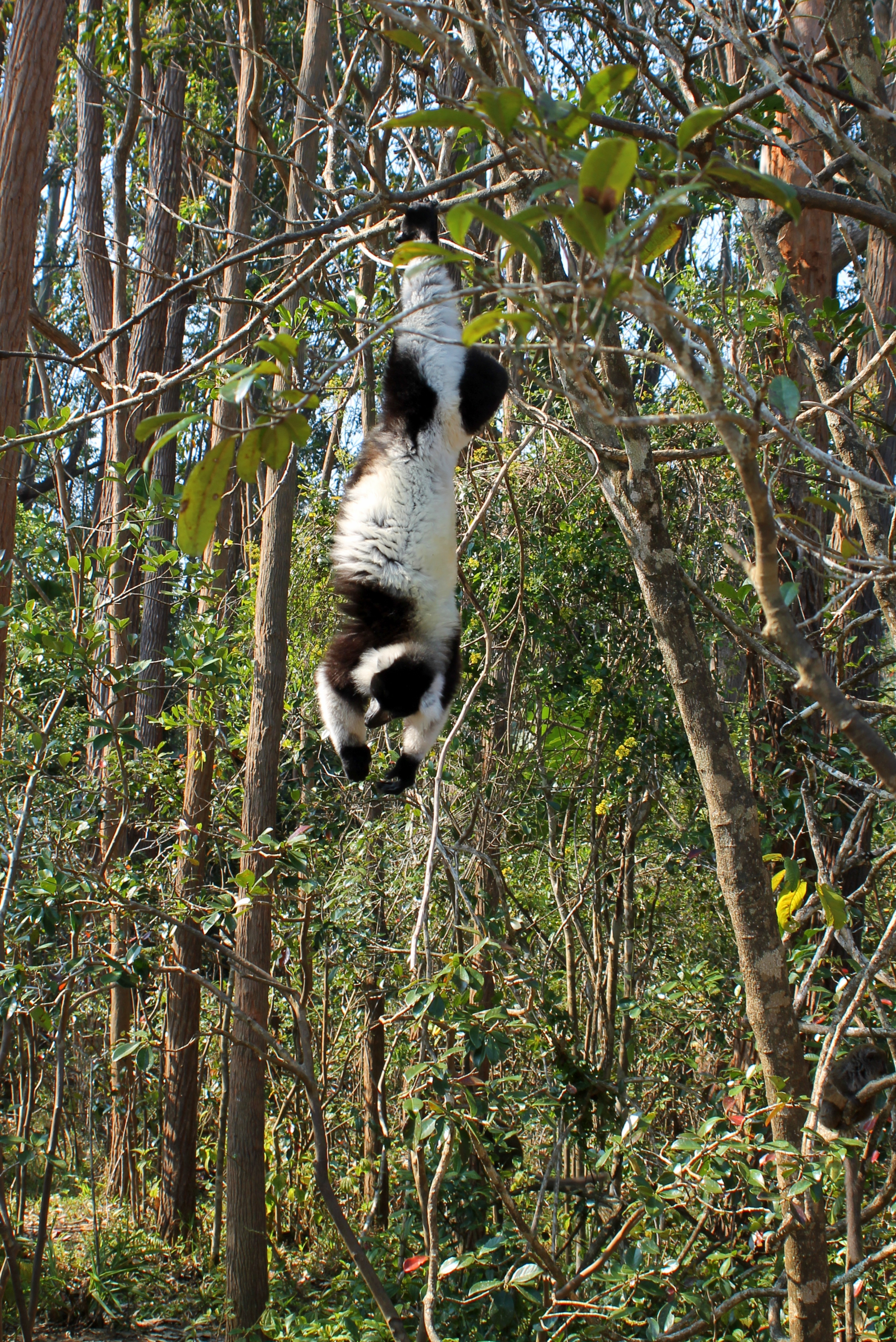 Vari op het Vakona-eiland